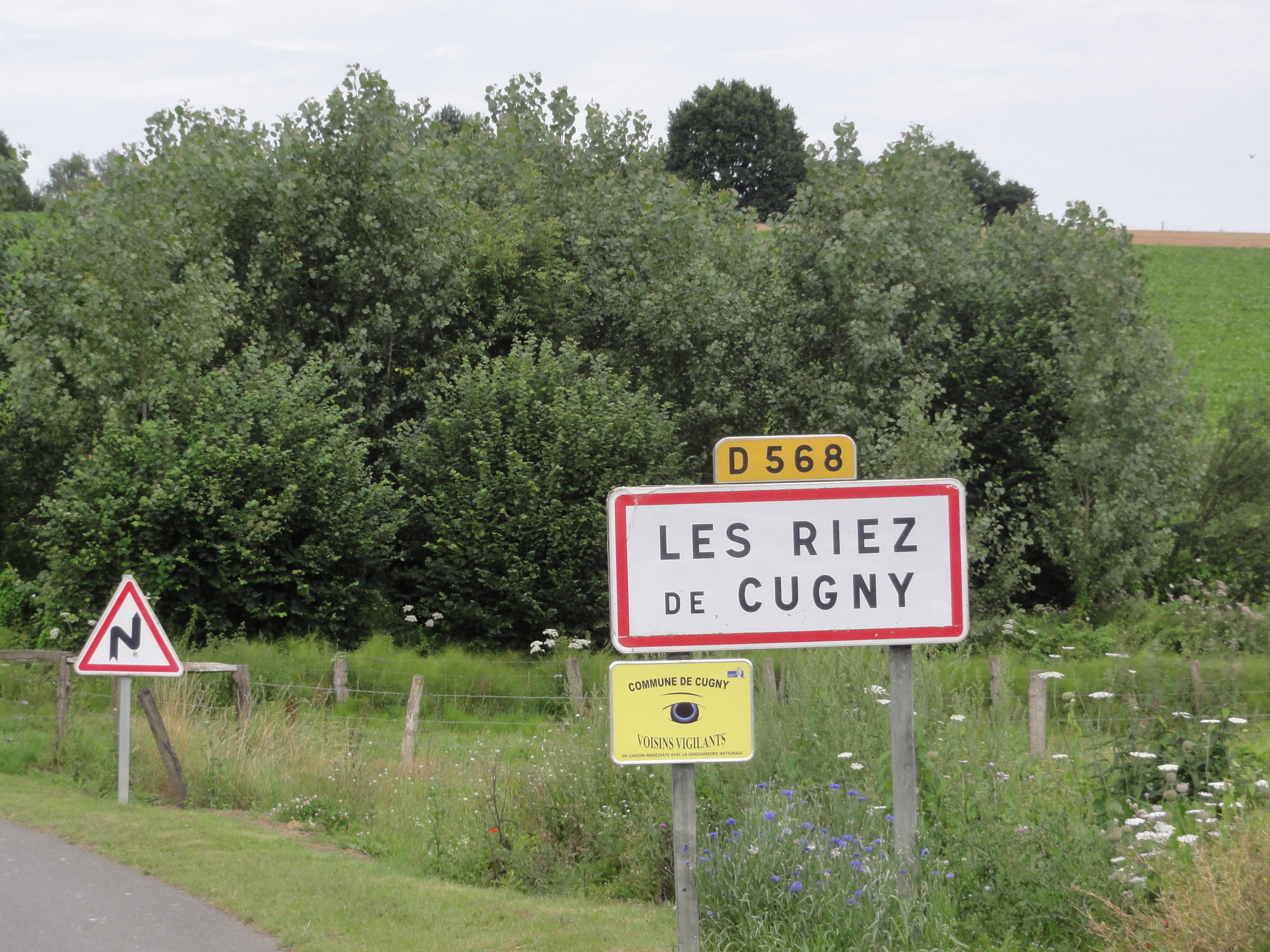 Cugny (Aisne) city limit sign Les Riez de Cugny